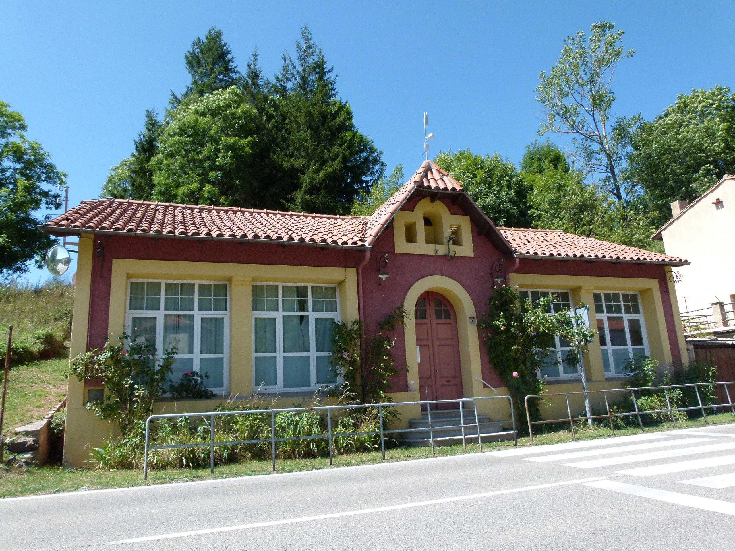 Colònia Estebanell (Camprodon)